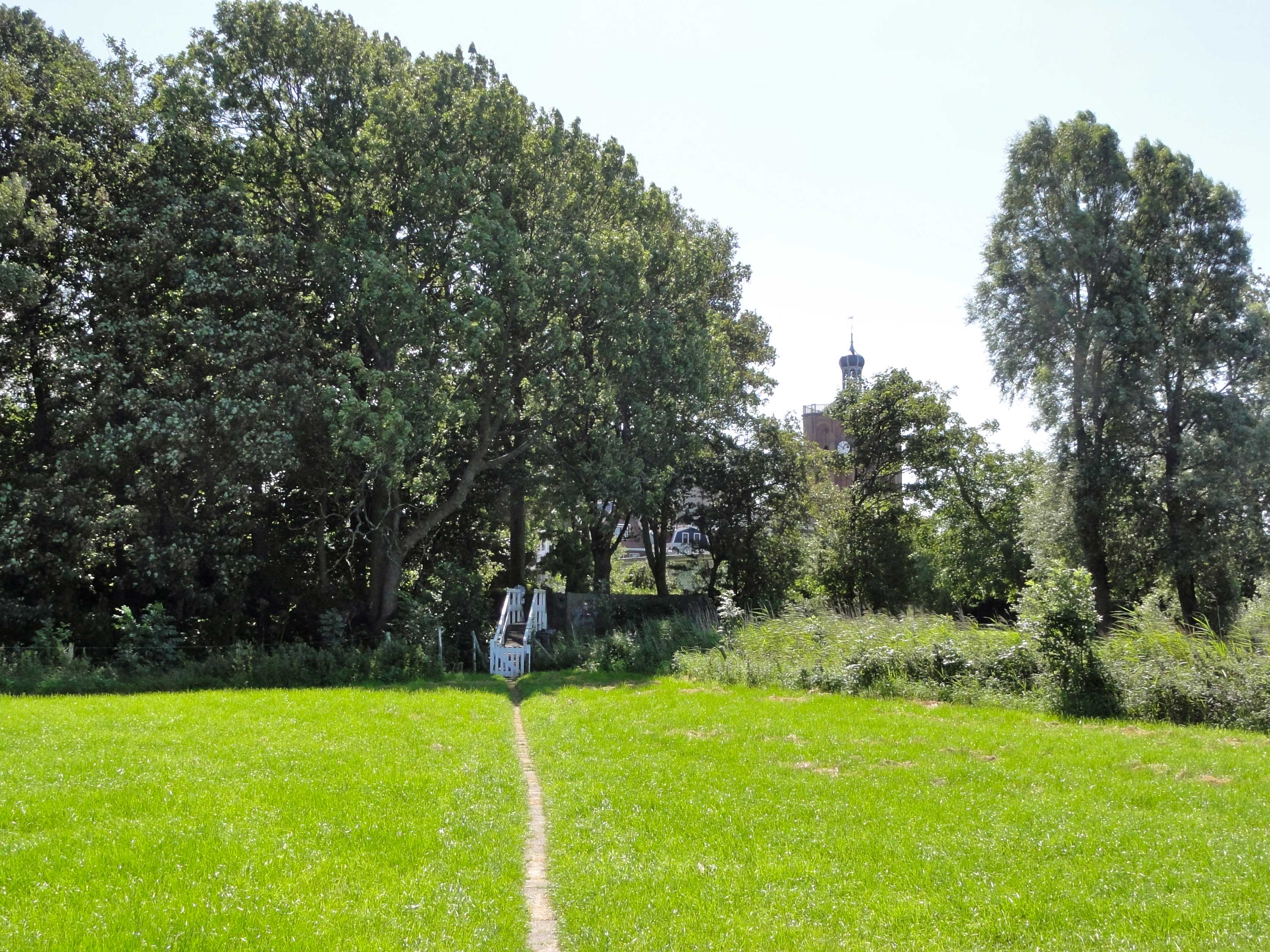 De Tillefonne, een eeuwenoud kerkenpad naar de Grote of Sint-Gertrudiskerk van Workum